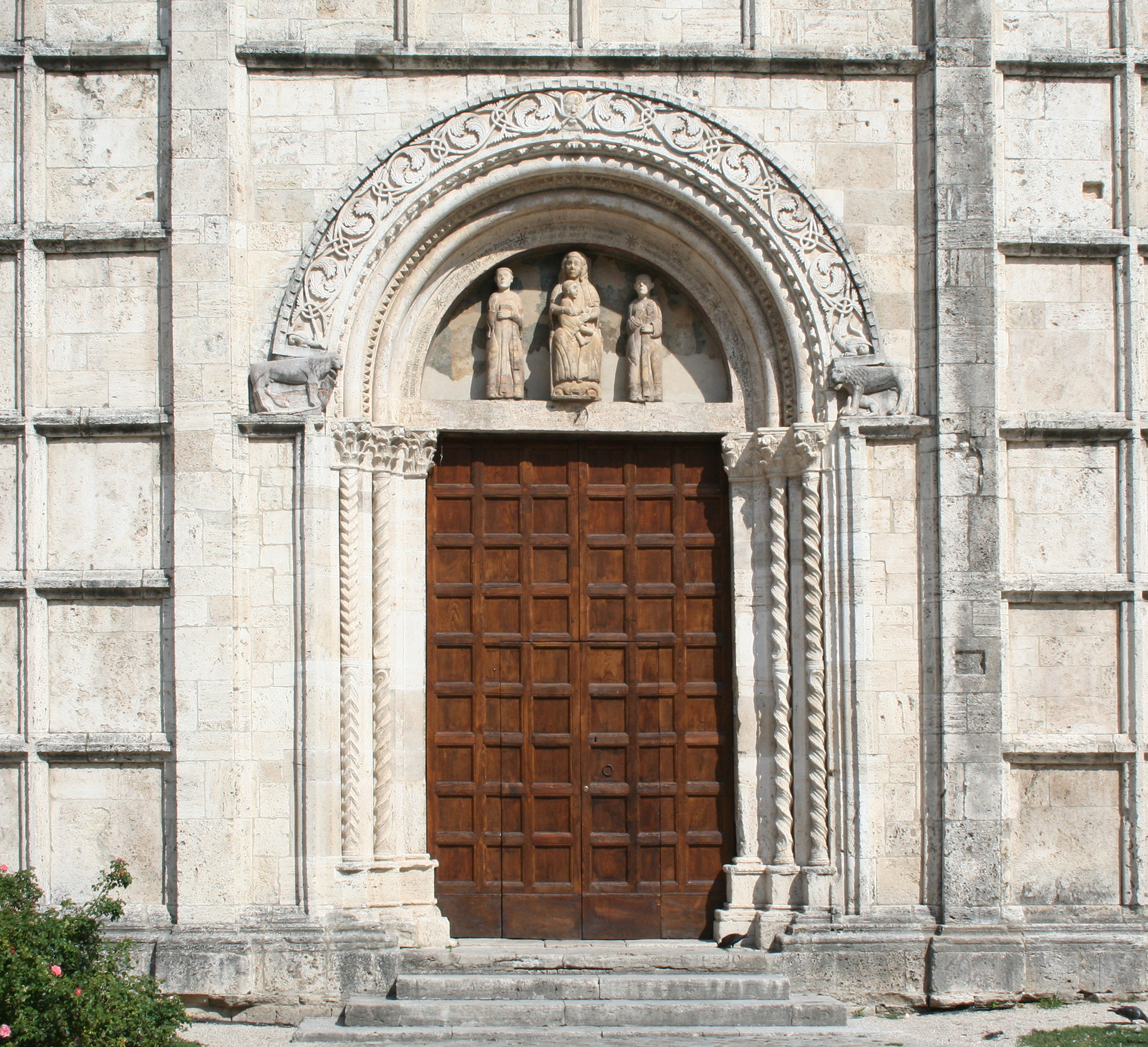 Portale maggiore della chiesa dei Santi Vincenzo e Anastasio di Ascoli Piceno.